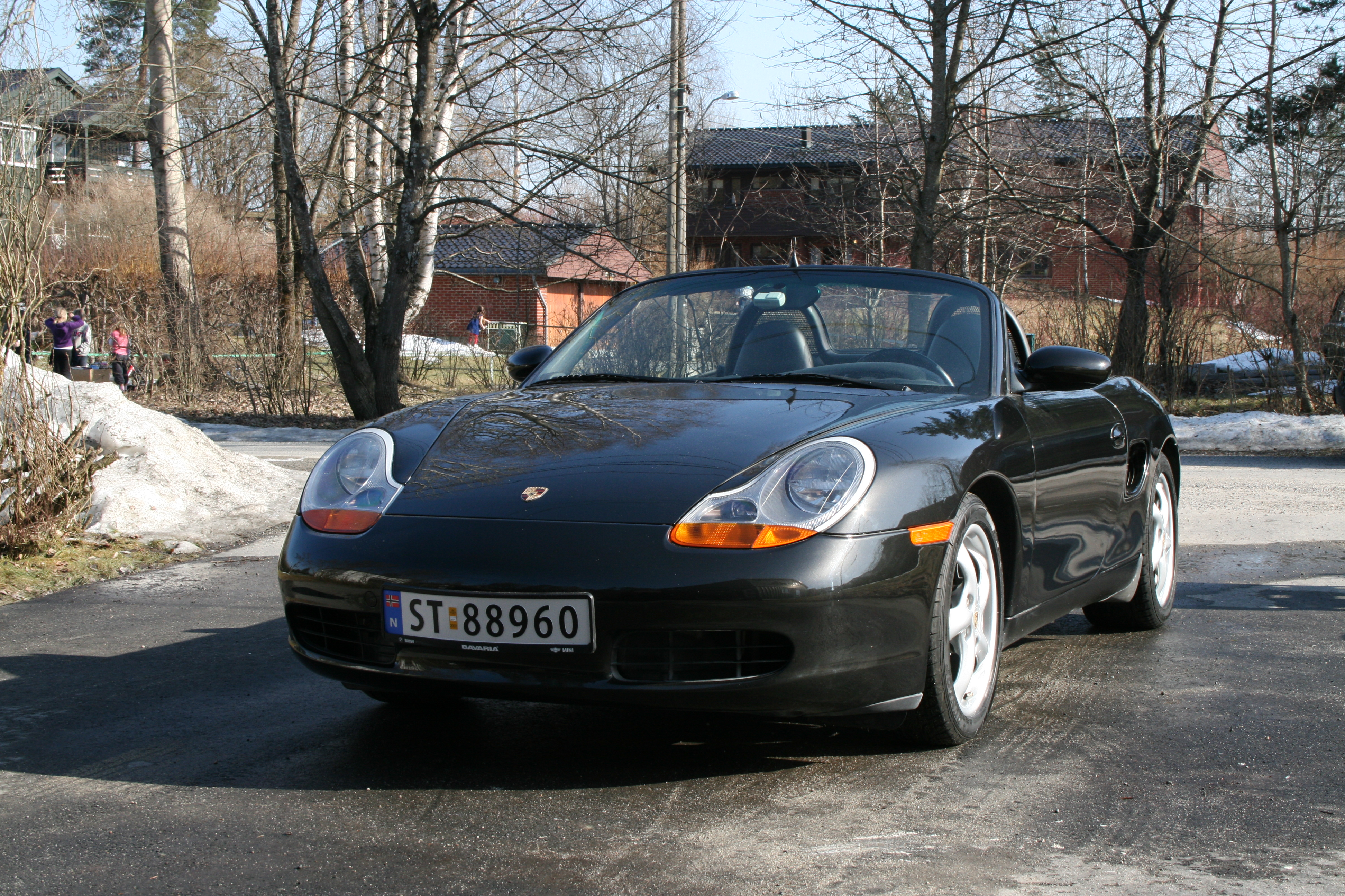 1998 Porsche 986 Boxster